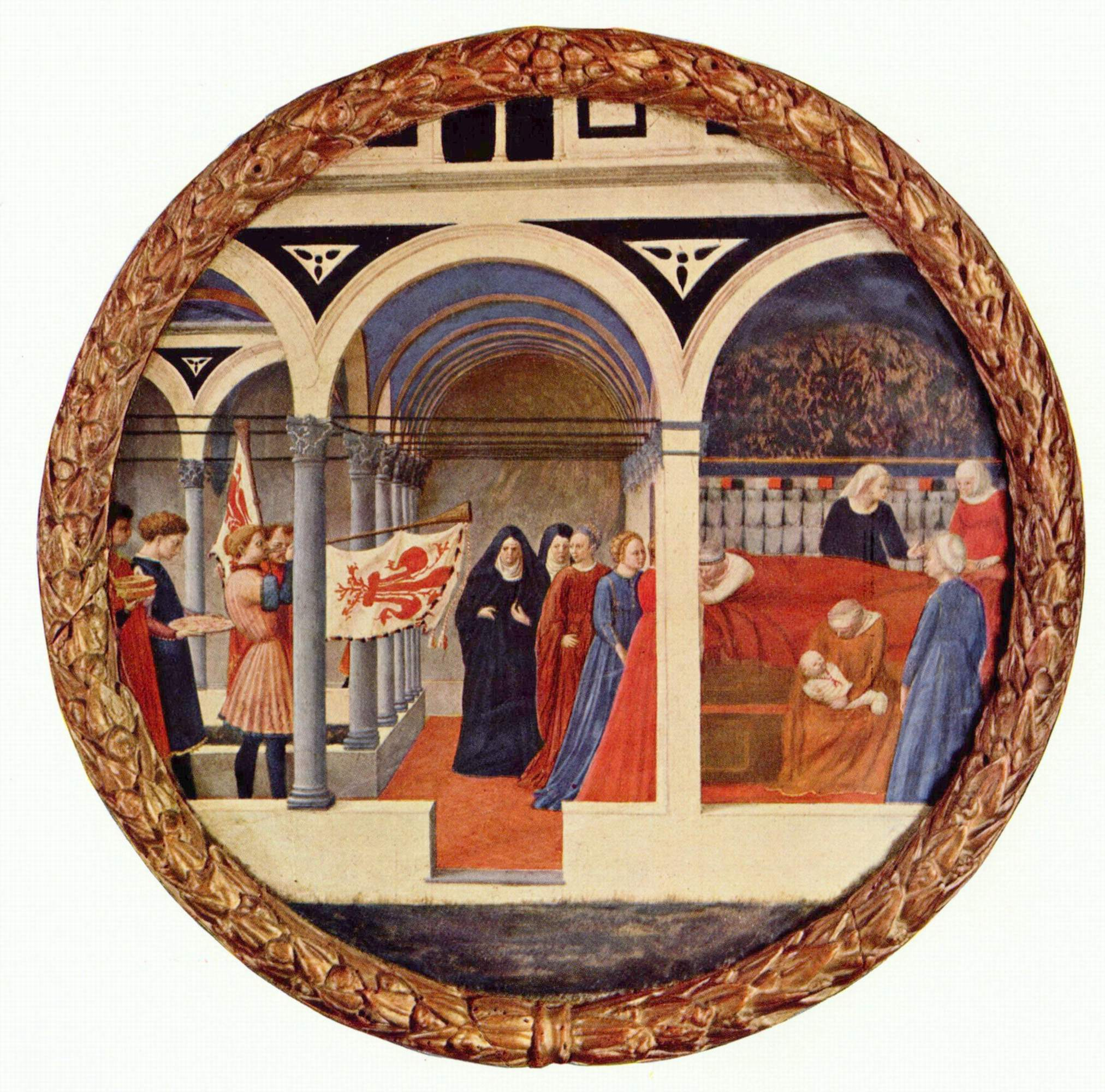 Tondo